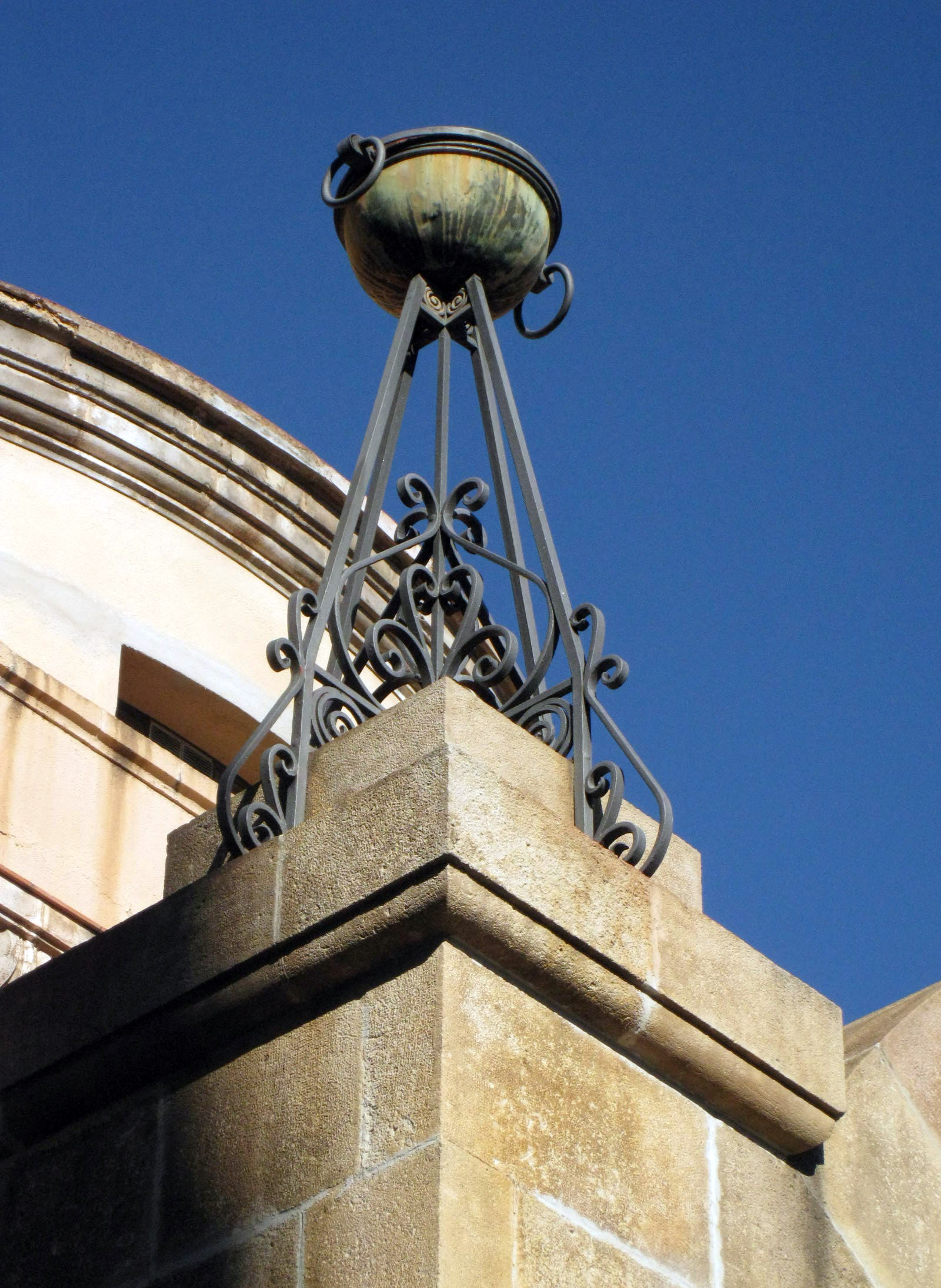 Cementiri Nou de Terrassa